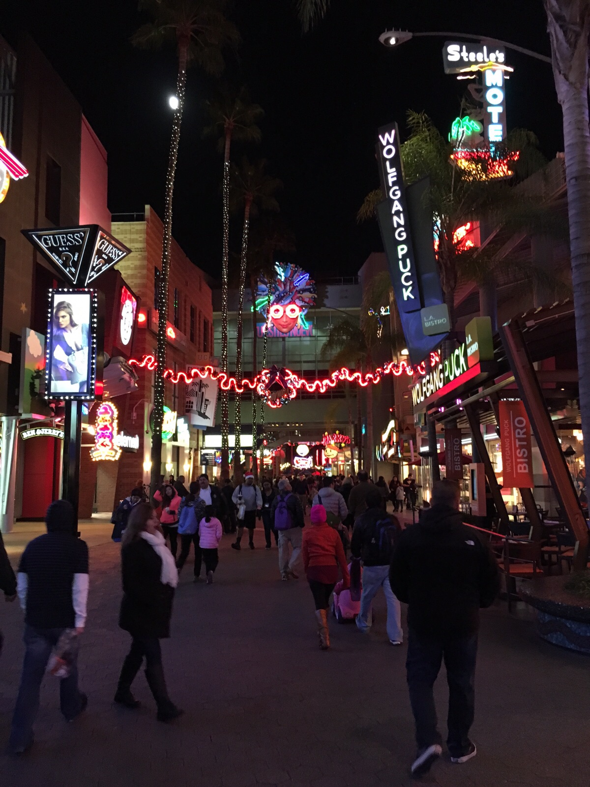 אולפני יוניברסל